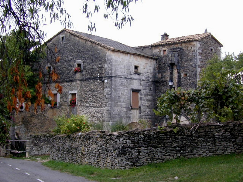 Bloque adosado a torre formando casa fortificada